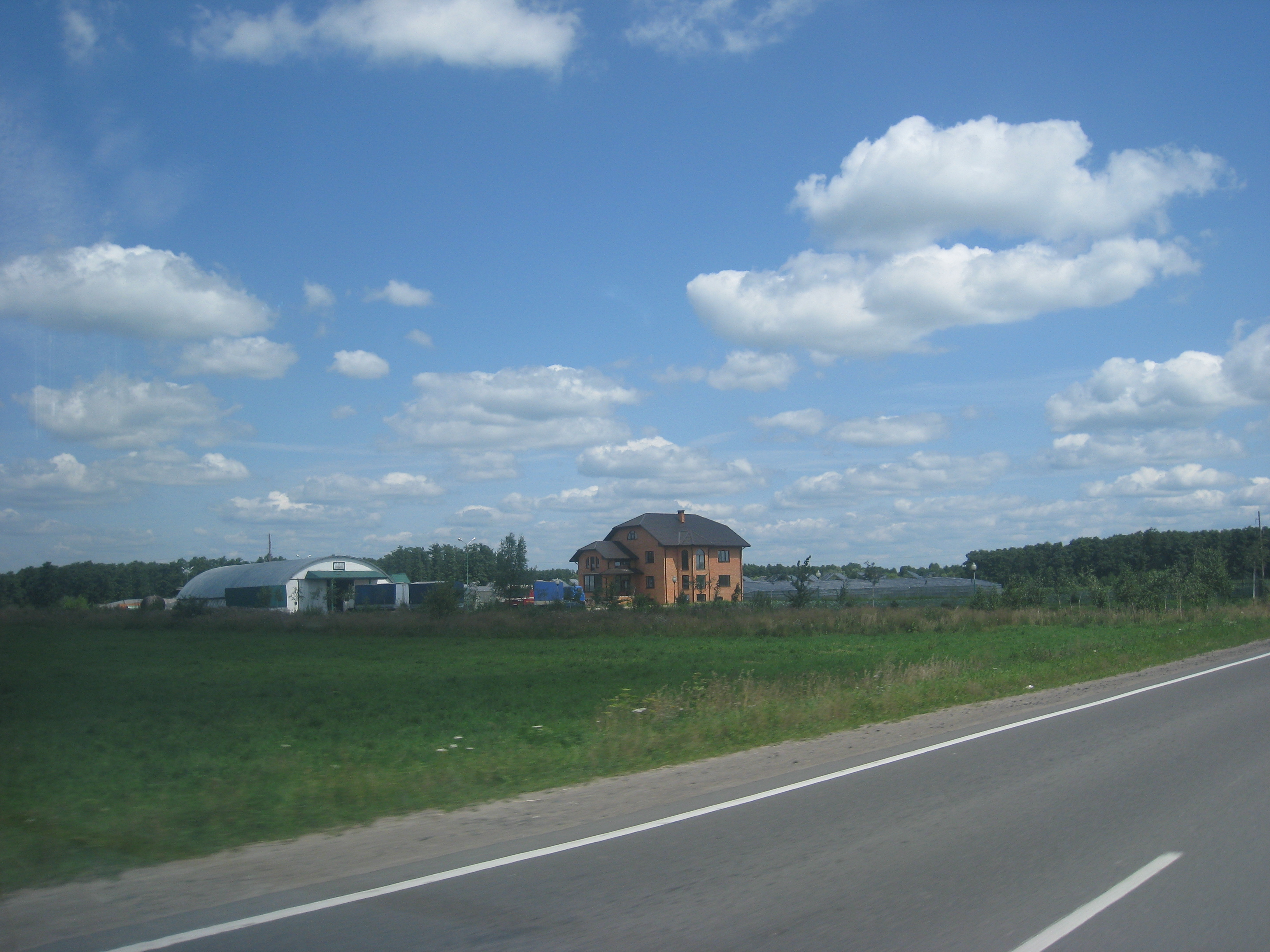 Альшаны (Столінскі раён). Фэрмэрская гаспадарка. Знаходзіцца на ўсходзе вёскі, на шашы Р88.